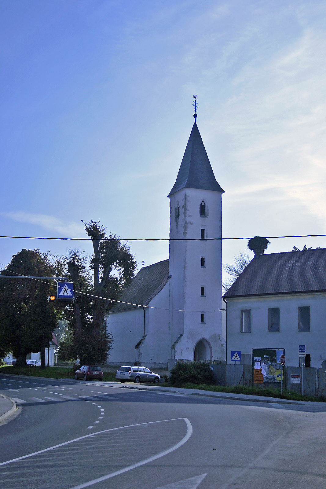 Cerkev svetega Martina, Martjanci. Saint Martin church, Martjanci. Heiliger Martin Kirche, Martjanci.